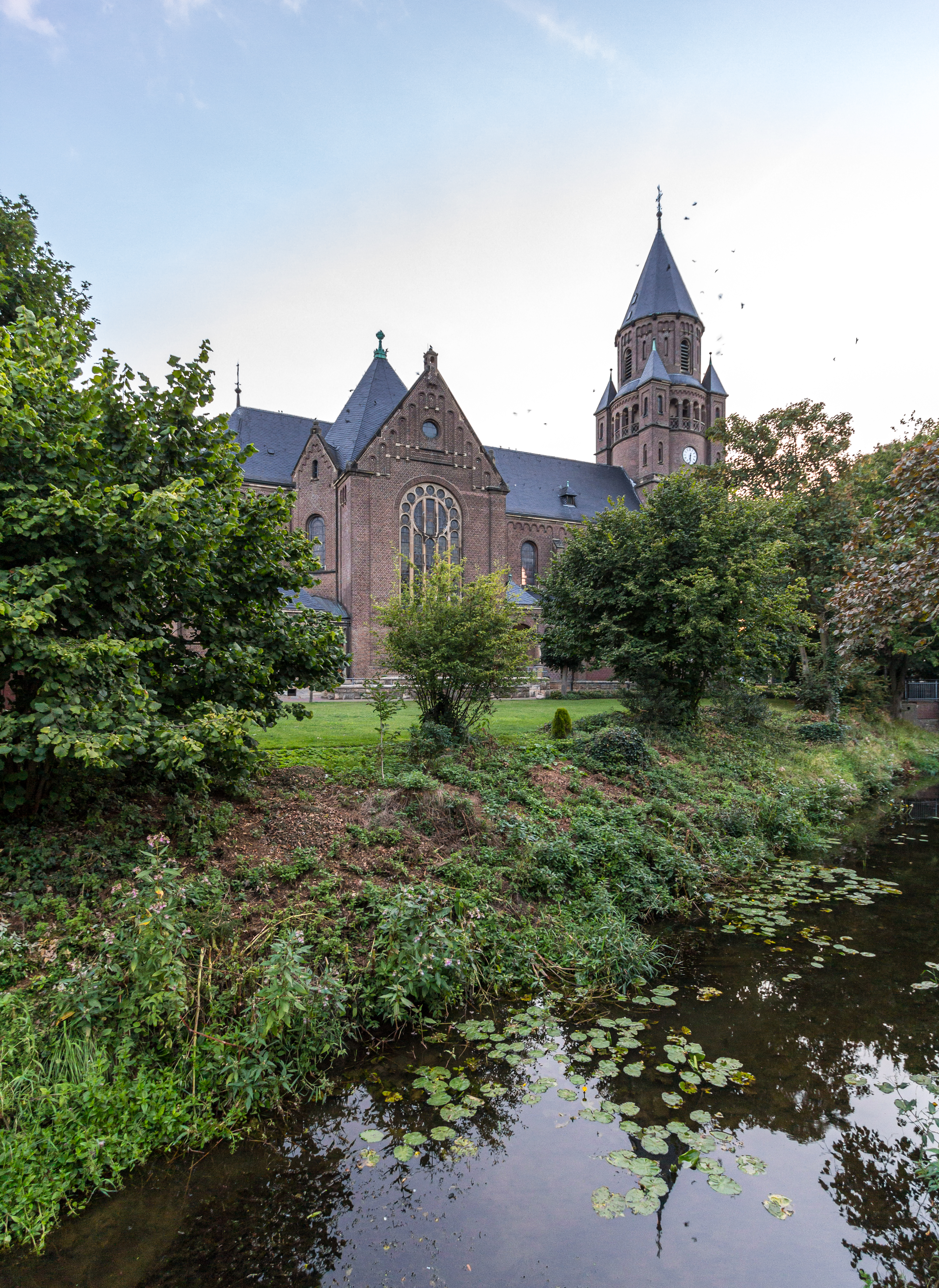 St.-Georg-Kirche in Hiddingsel, Dülmen This image shows a heritage building in Germany, located in the North Rhine-Westphalian city Dülmen (no. 24).